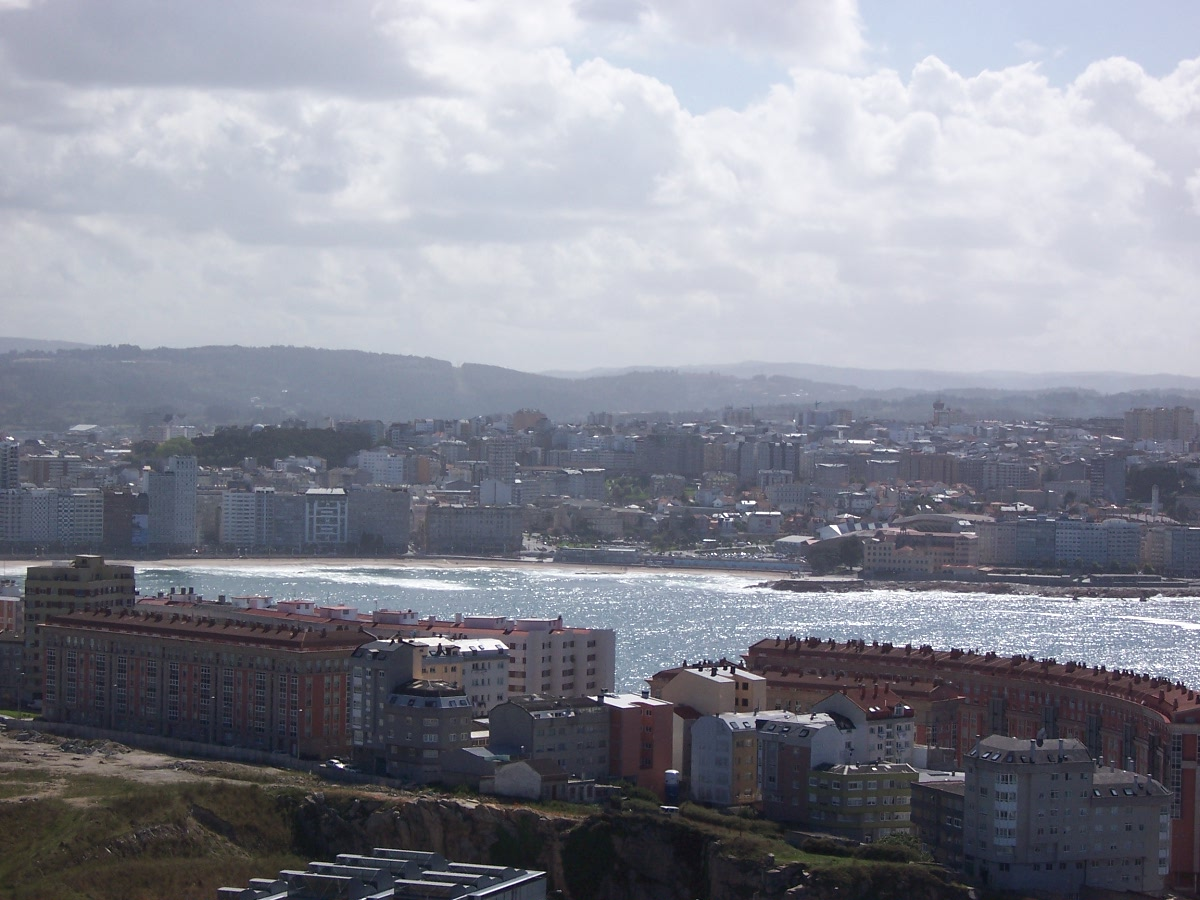 Spain 2004 september KODAK 7440 camera Source: Daniel Csörföly